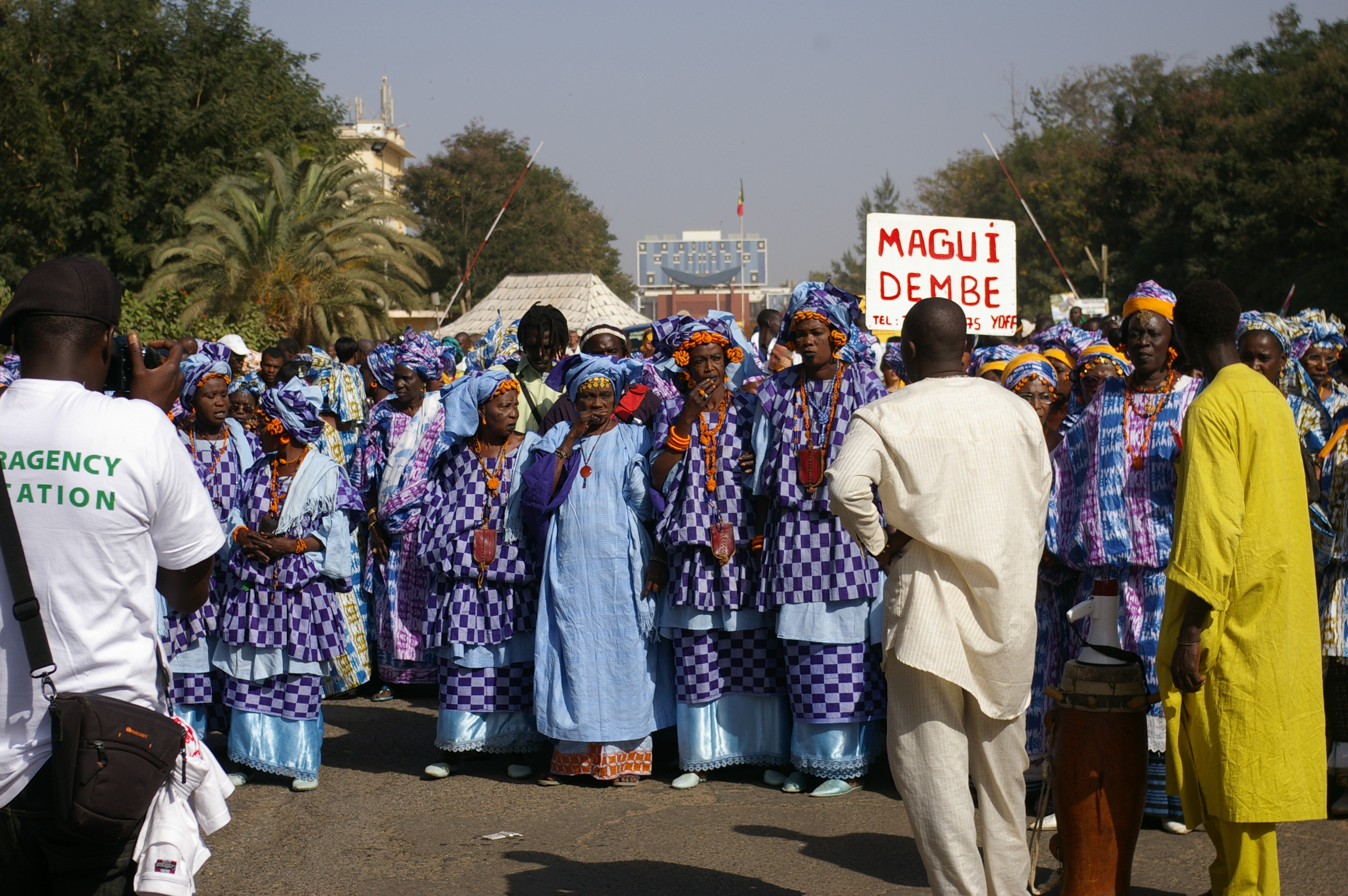 Marcha en Dakar con motivo del inicio del Foro Social Mundial de 2011